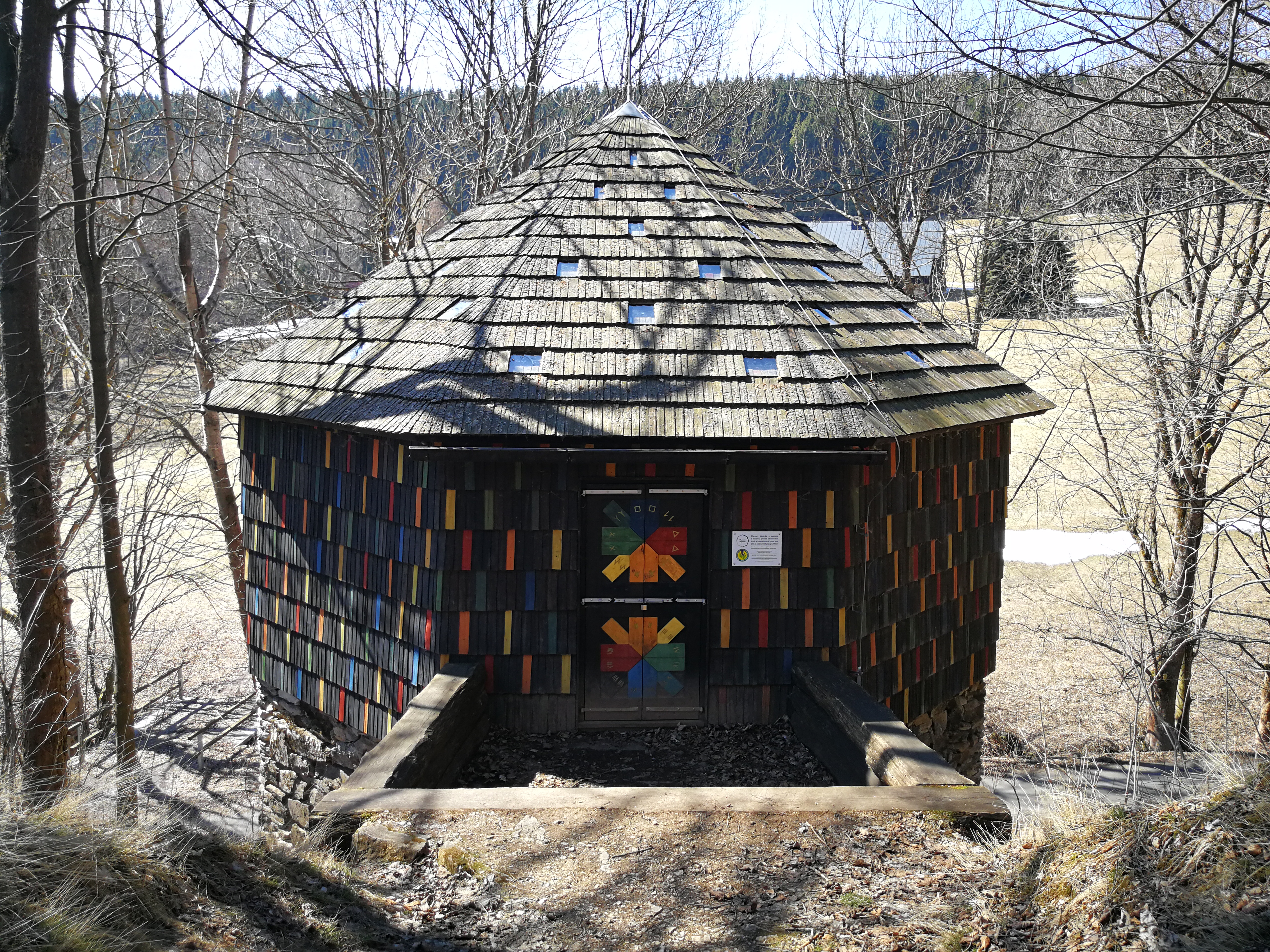 Muzeum vápenka.